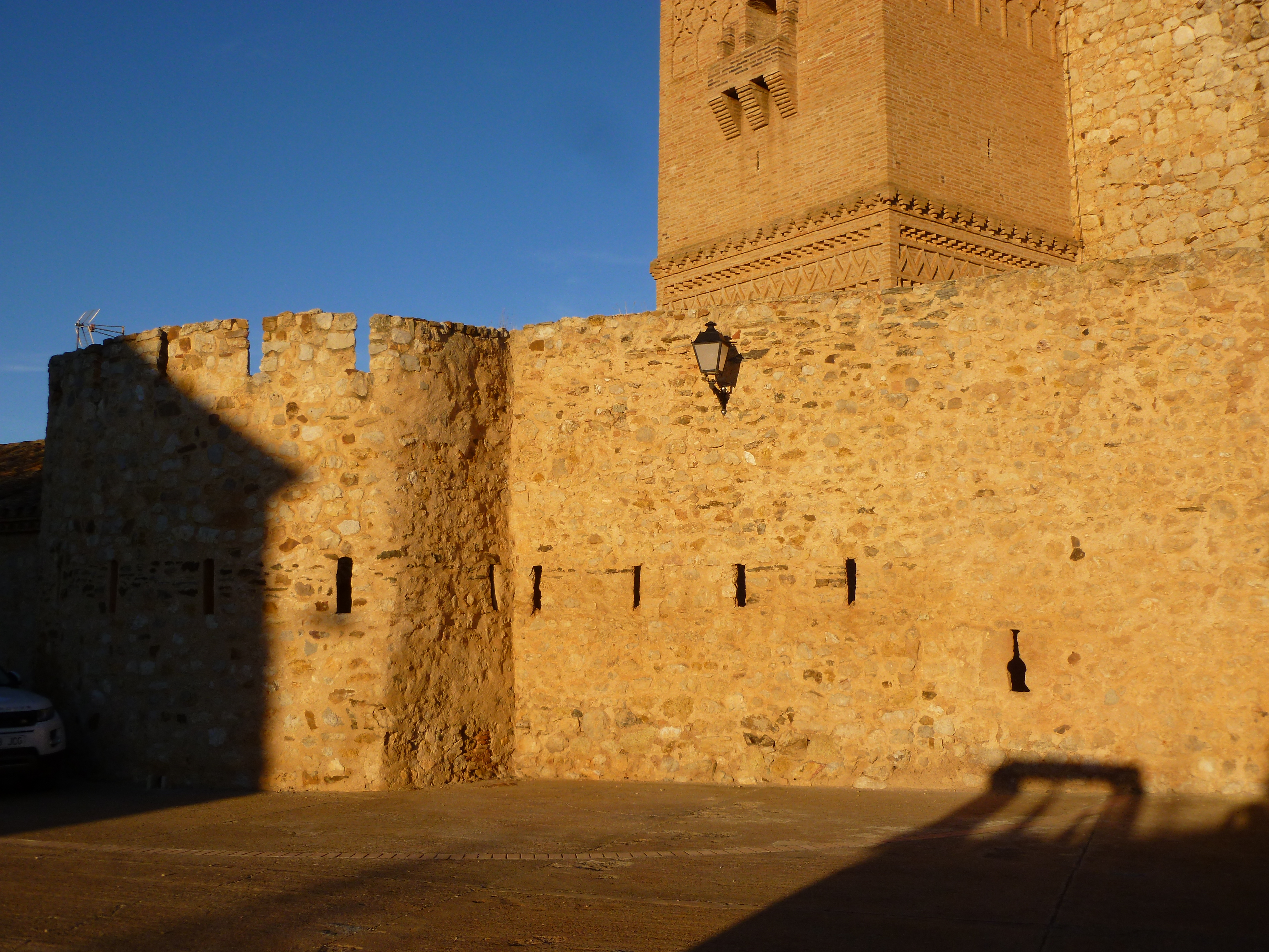 Romanos